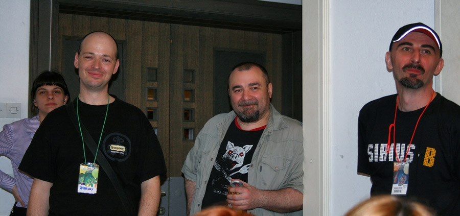 Konvencija Kontakt, koja je spojila 34. SFeraKon i 34. Eurocon u Zagrebu. Nela Dunato, Zoran Krušvar, Vanja Spirin, Davorin Horak.